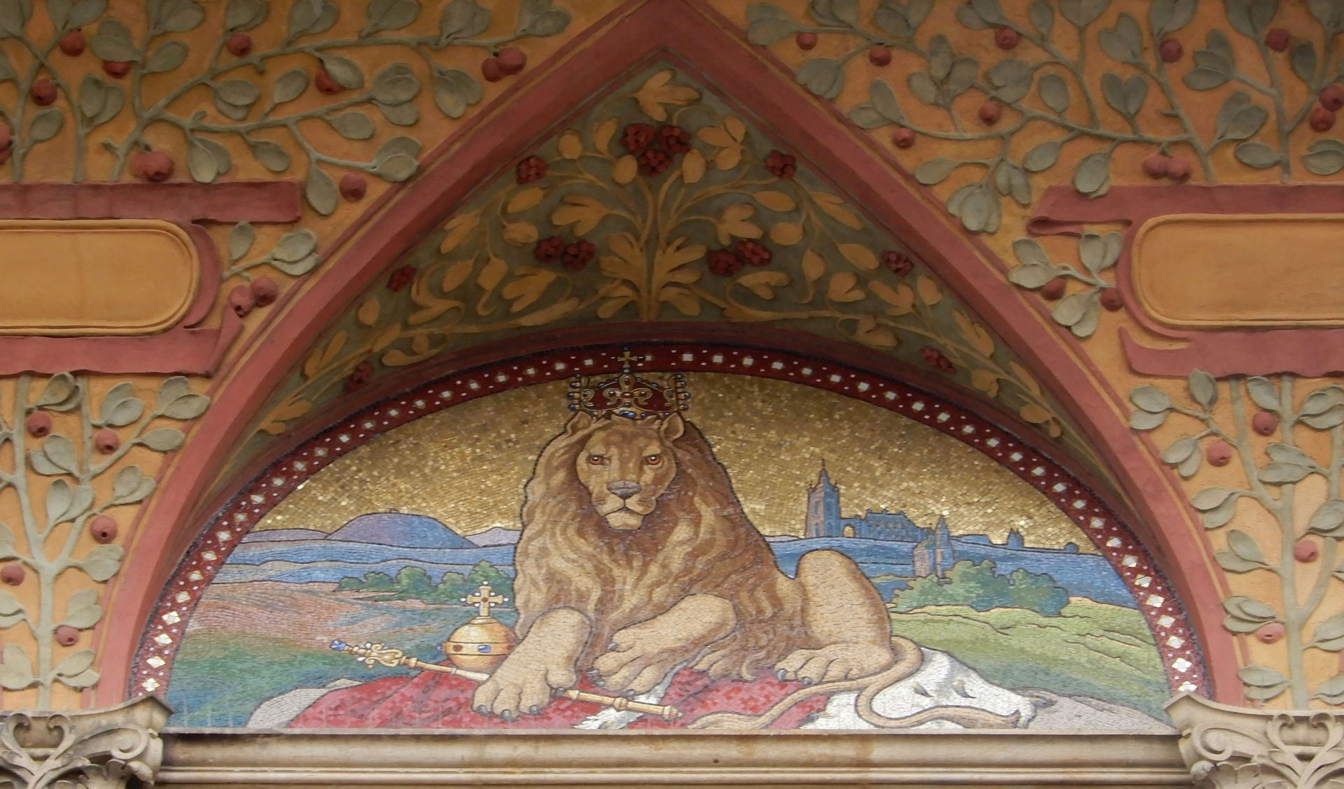 Alegorie Českého království, mozaika na fasádě paláce čp.858-II Na příkopě 20, František Urban, provedl Albert Neuhauser, instalovala firma Luigi Solerti z Innsbrucku (1898-1899)